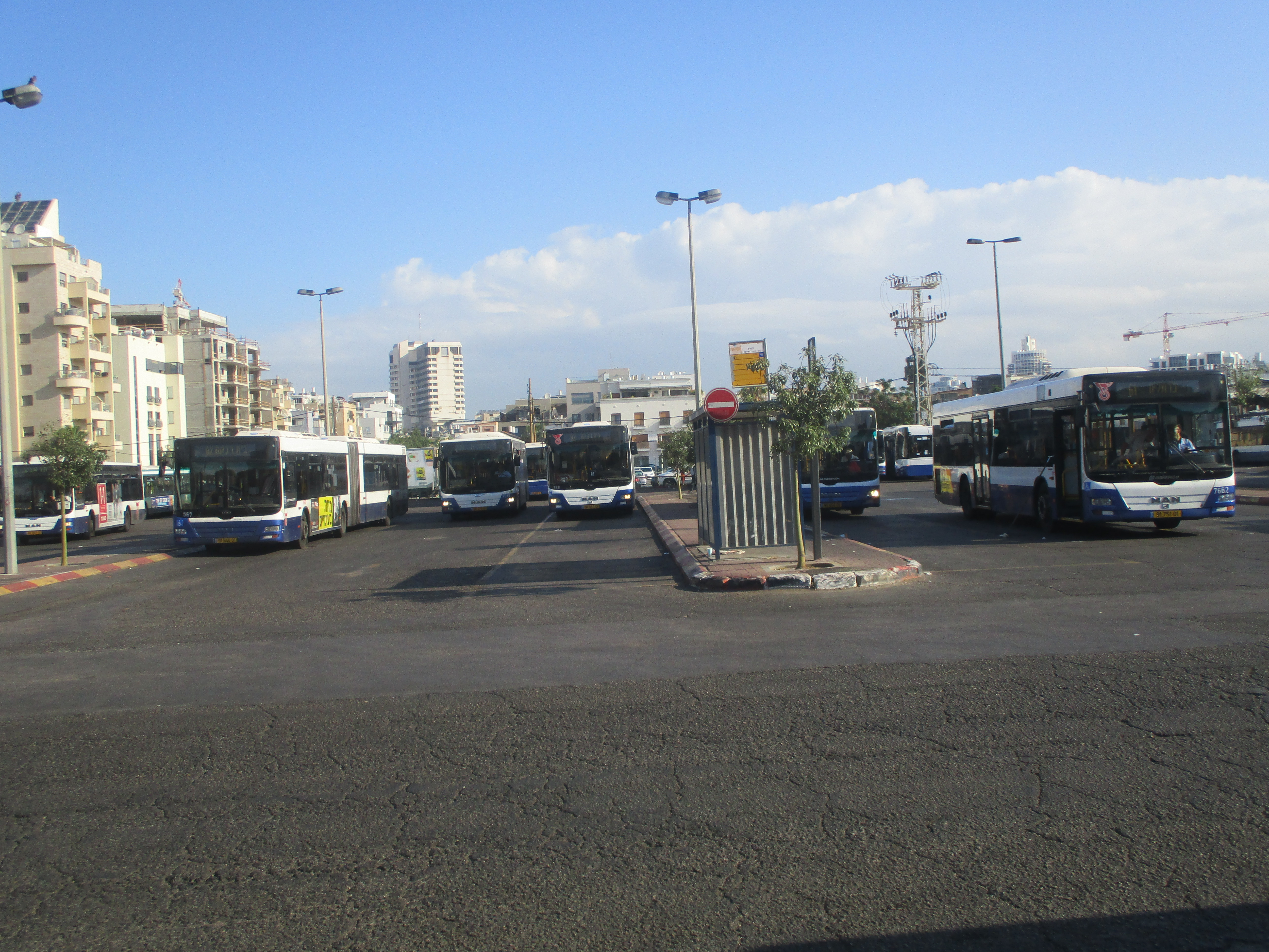 מסוף כרמלית תל אביב